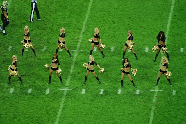 Saintsations! NFL London 2008